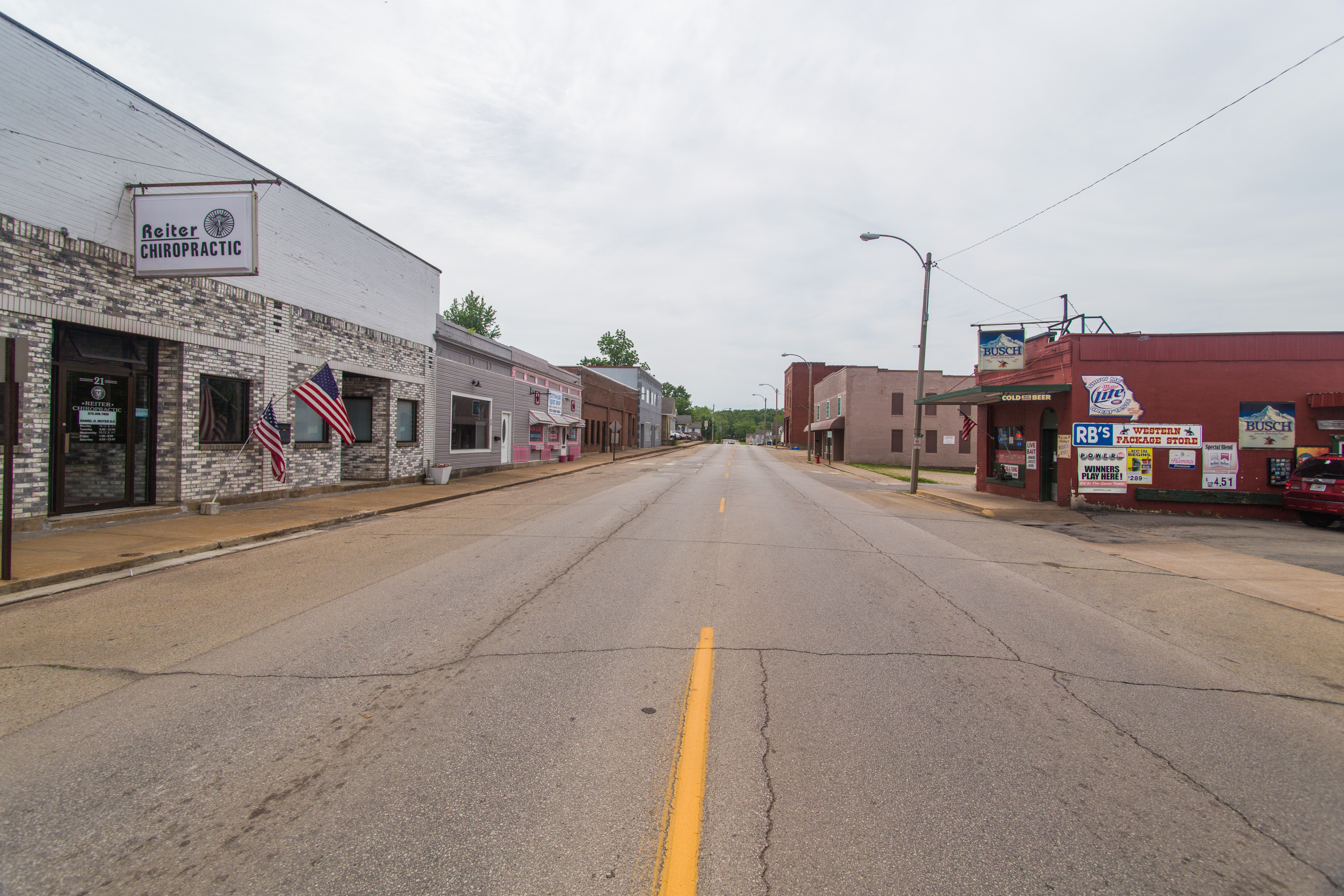 Bonne Terre, Missouri